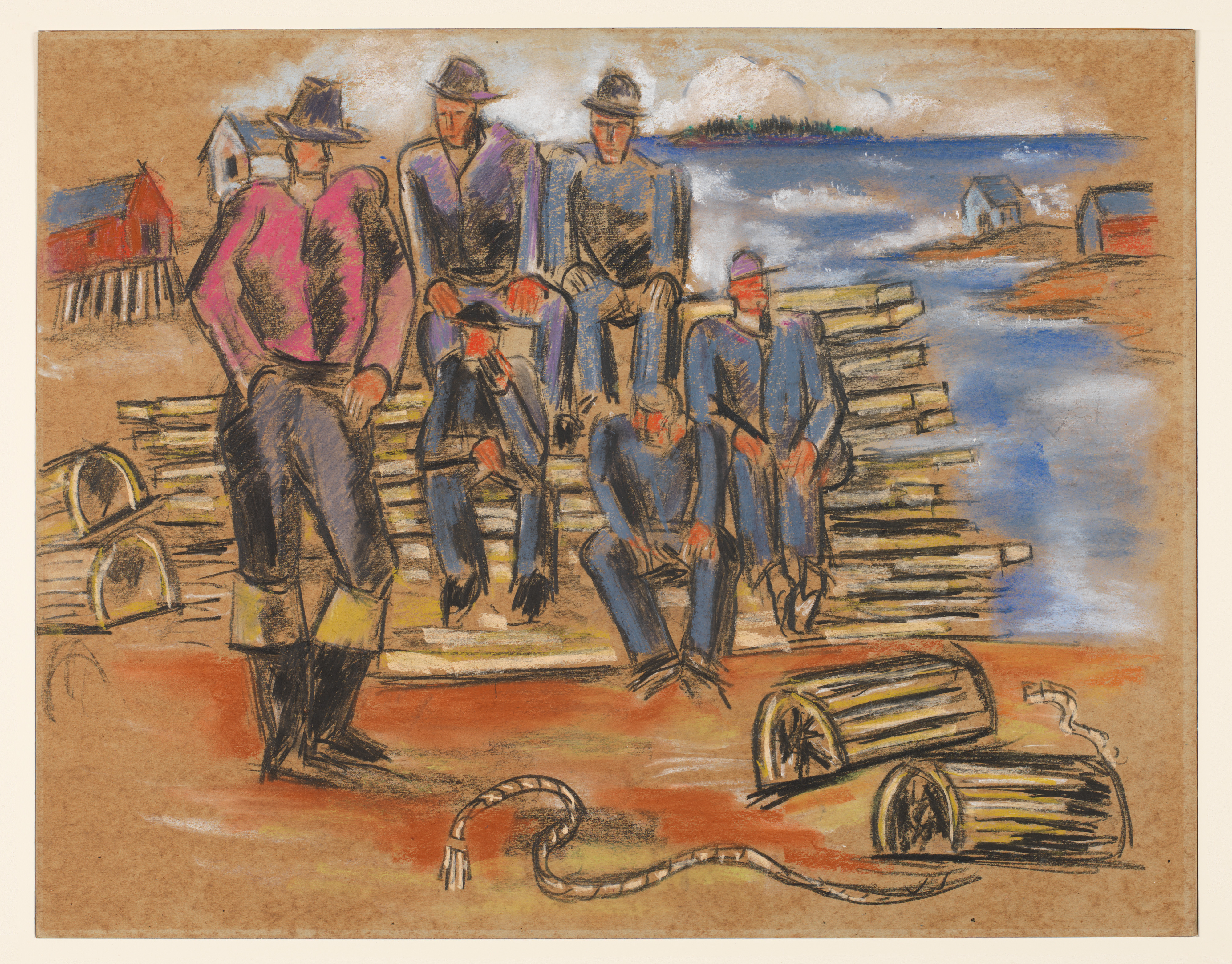 Drawing; Drawings